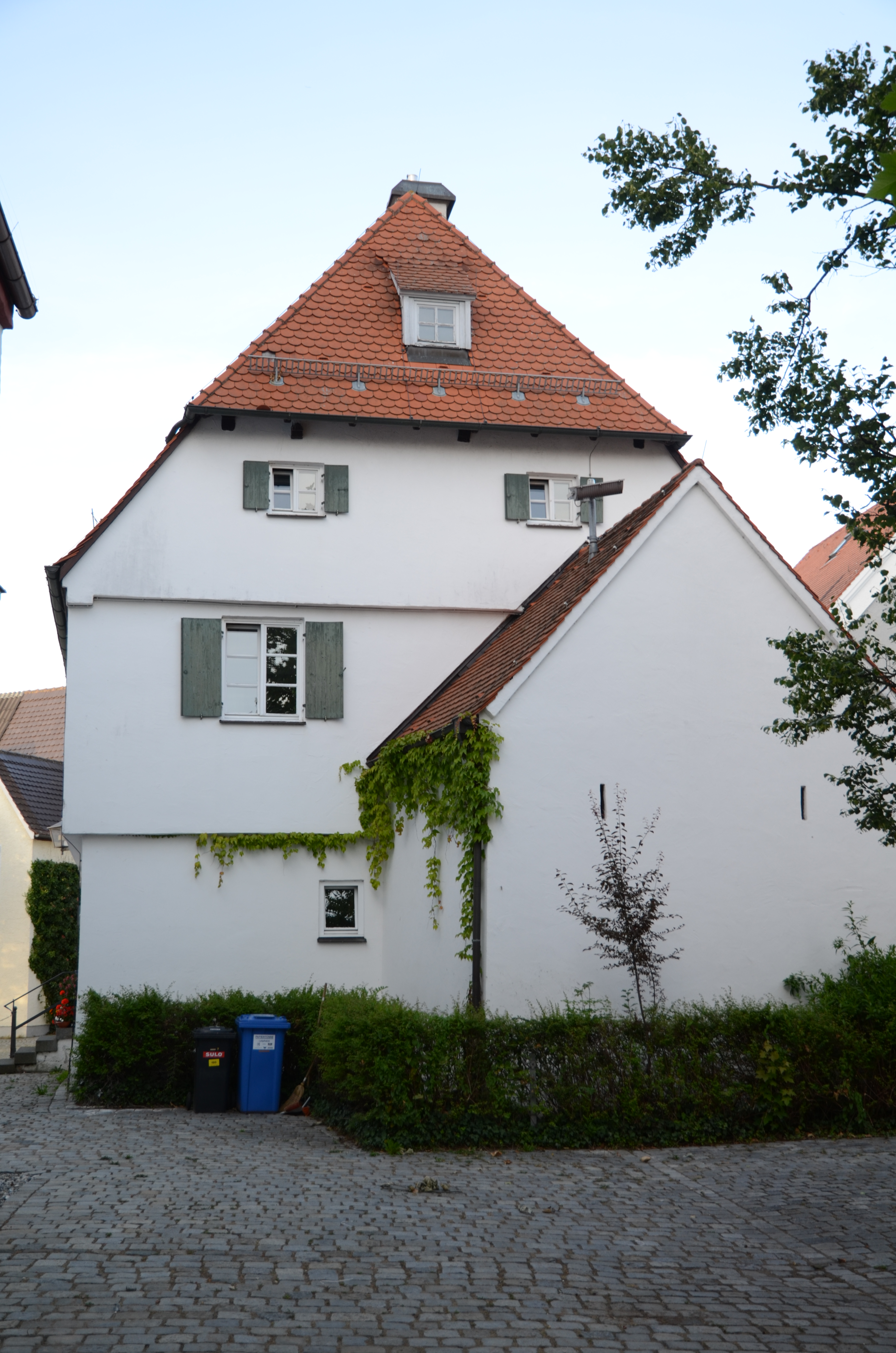 Leipheim Kirchplatz 2, Kantorenhaus